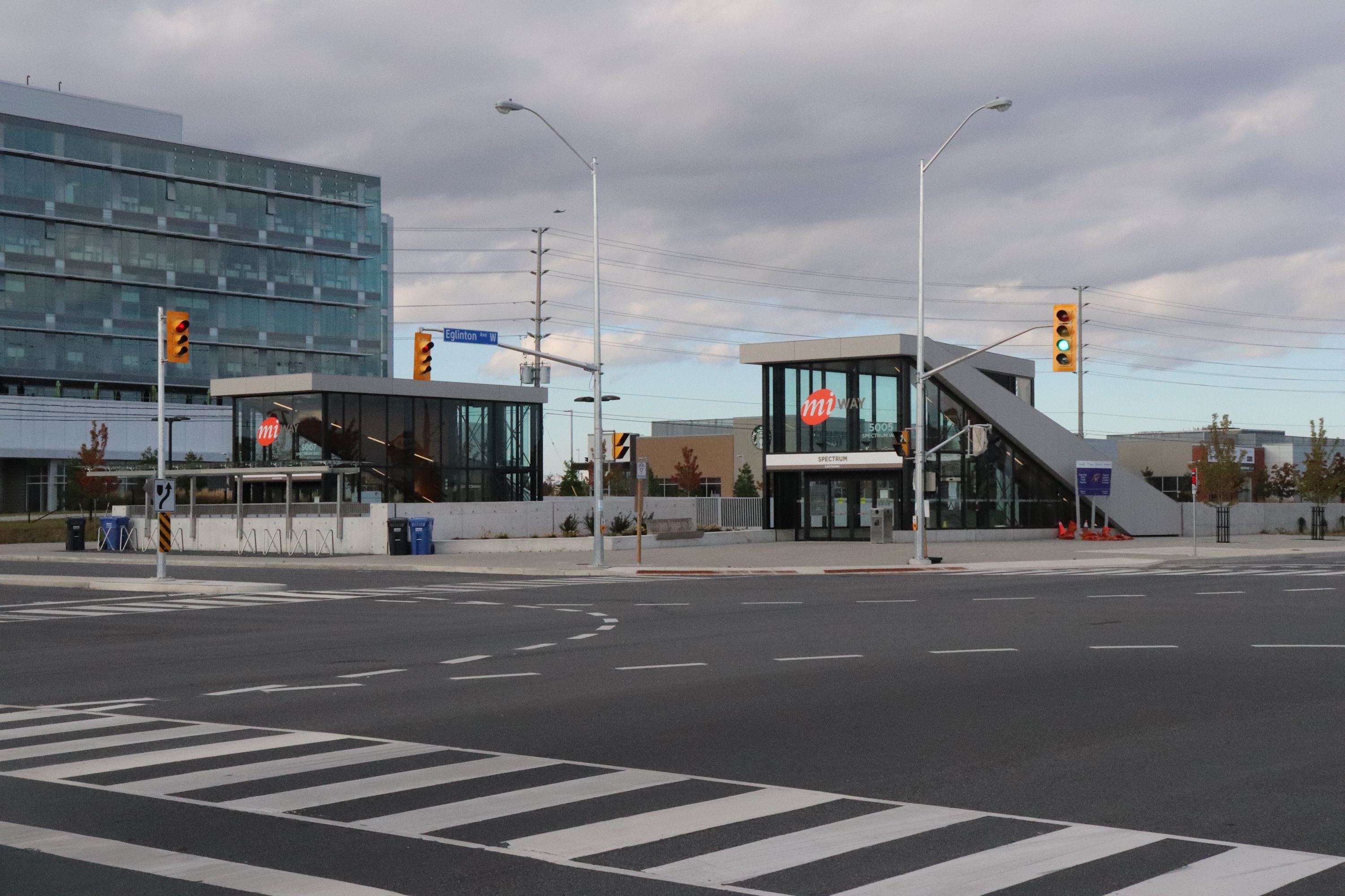 Станція Spectrum швидкісного автобуса MiWay в Етобіко (Онтаріо).